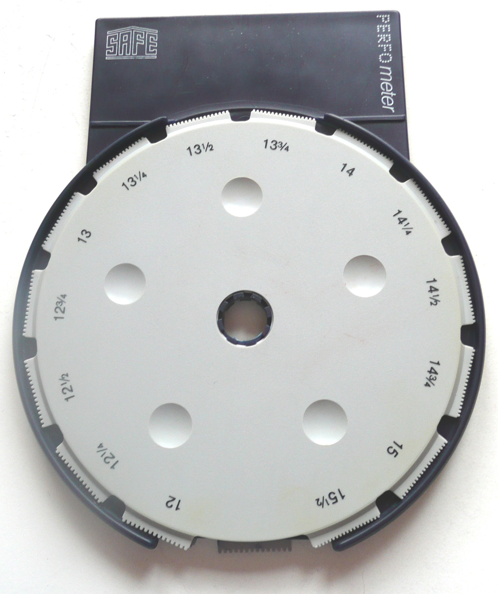 Zähnungsmesser "Perfometer"